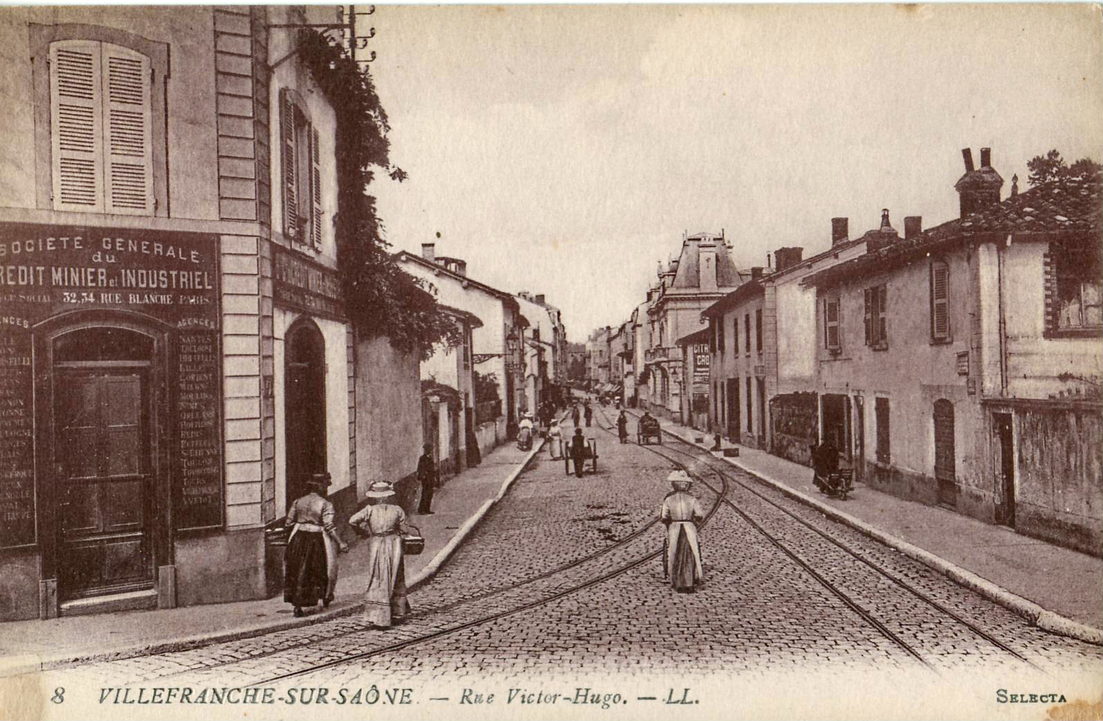 Carte postale ancienne éditée par LL, n°8, collection Selecta : VILLEFRANCHE (Rhône) - Rue Victor-Hugo.On distingue les rails des Chemins de fer du Beaujolais